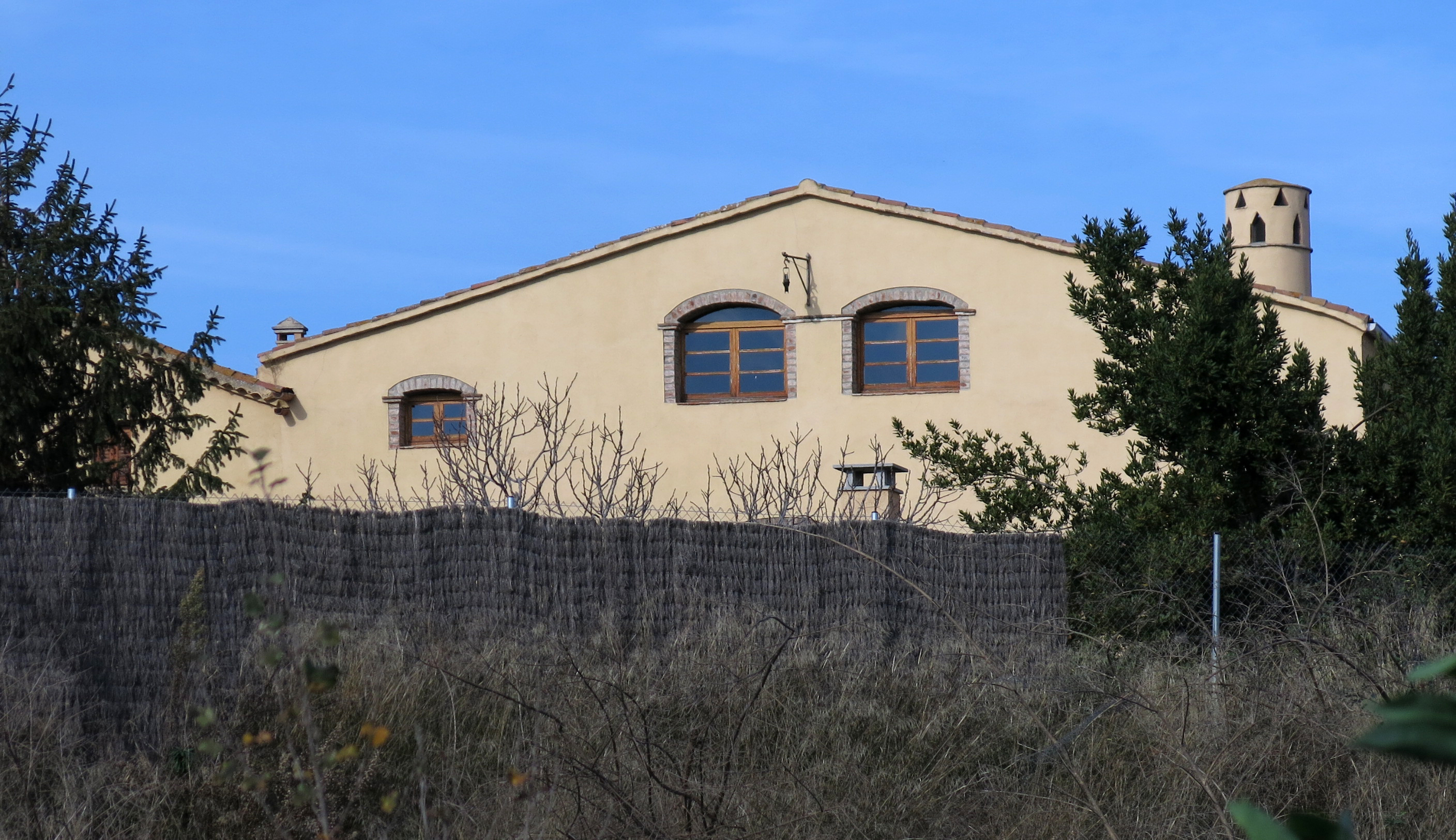 Can Colomer (Terrassa)